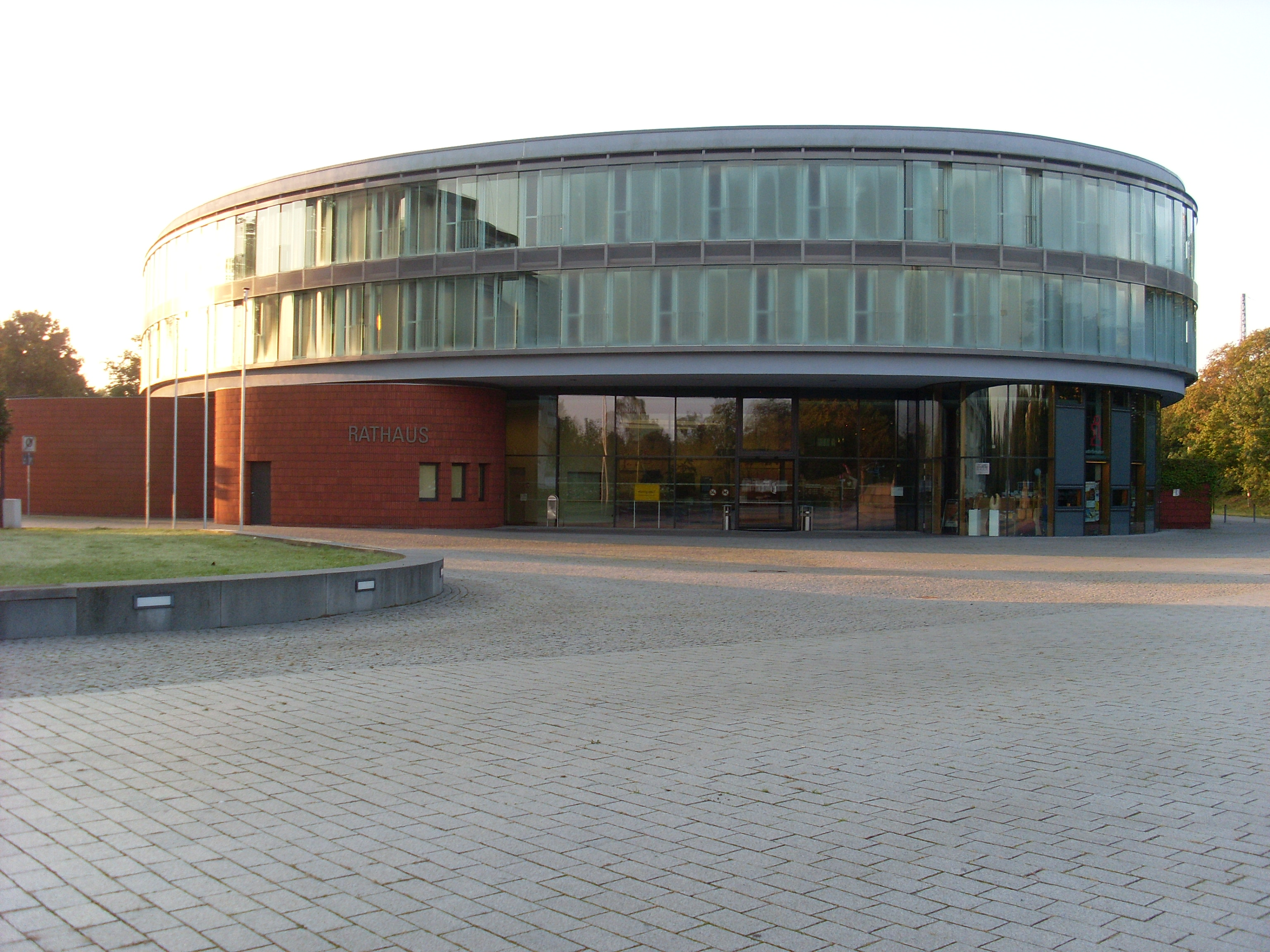 neues Rathaus von Hennigsdorf (selbst fotografiert)